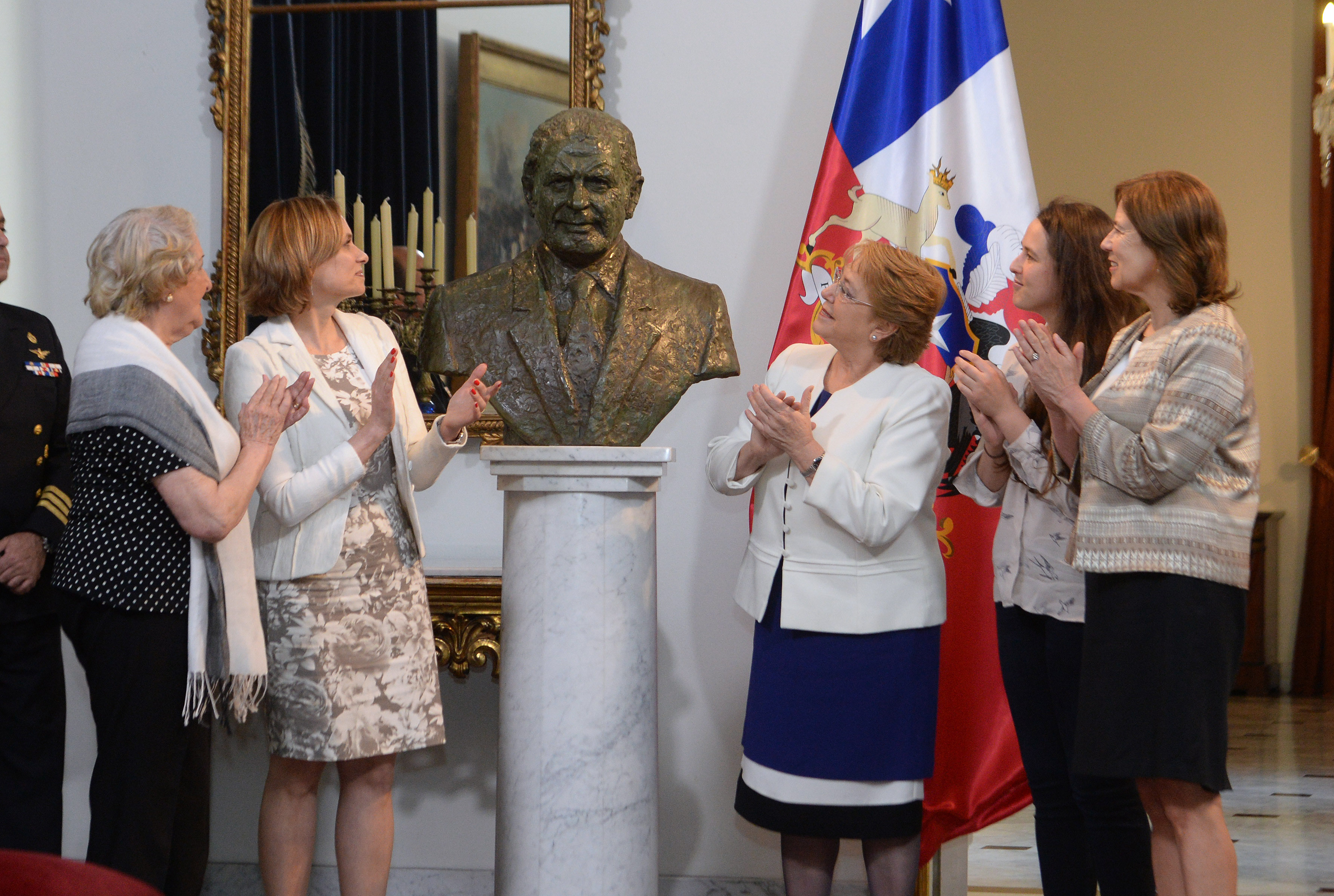 La presidenta de Chile, Michelle Bachelet, develó el busto del presidente Patricio Aylwin (1918-2016), que estará en la Galería de los Presidentes en el Palacio de La Moneda. La escultura es obra de Galvarino Ponce, quien se la habría a Aylwin cuando este cumplió 90 años, pero no había sido entregado físicamente; luego de su muerte, la viuda de Ponce se contactó con la familia Aylwin, que mandó a fundirla en bronce.